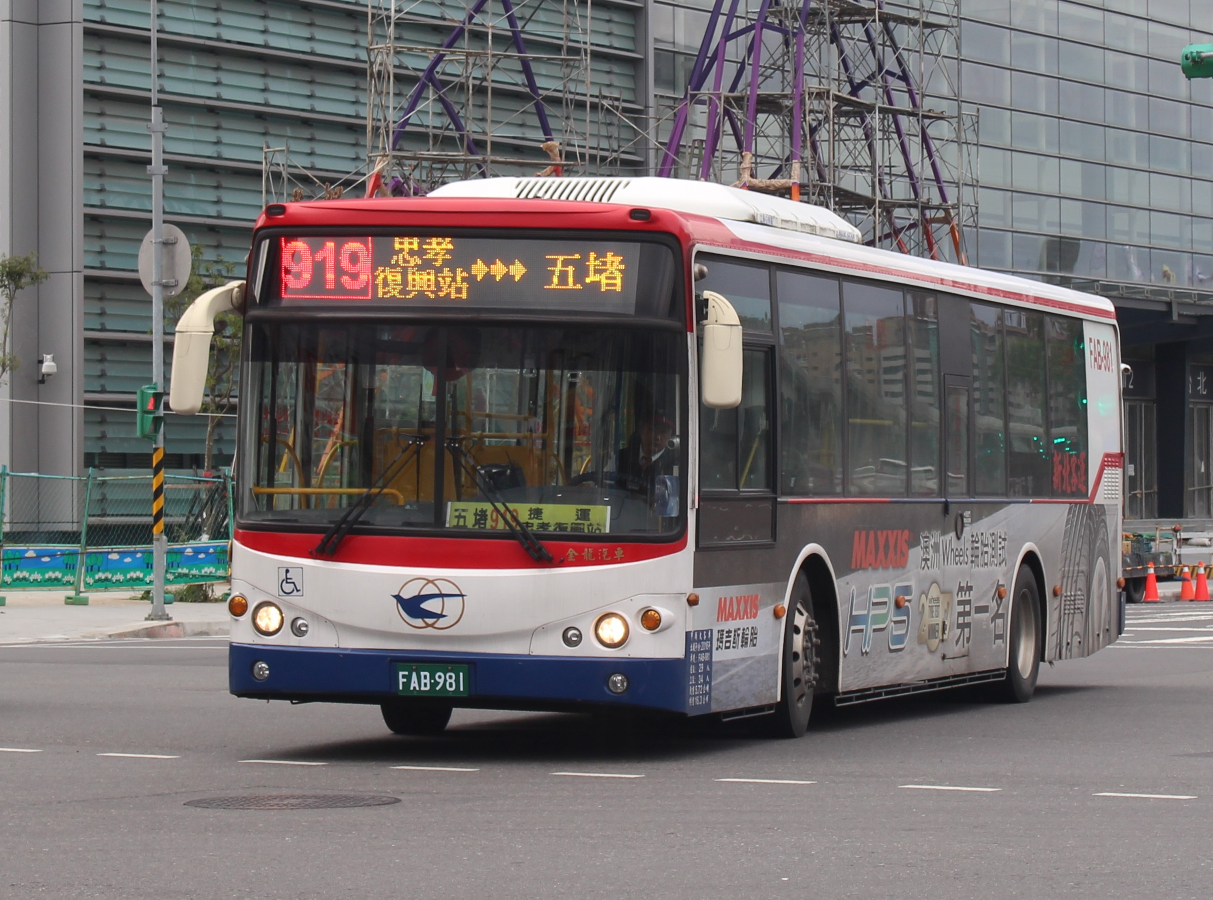 新北客運2016 KINGLONG KL6112U1 FAB-981 919